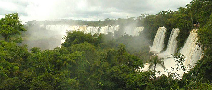 Slapovi Iguazu z argentinske strani